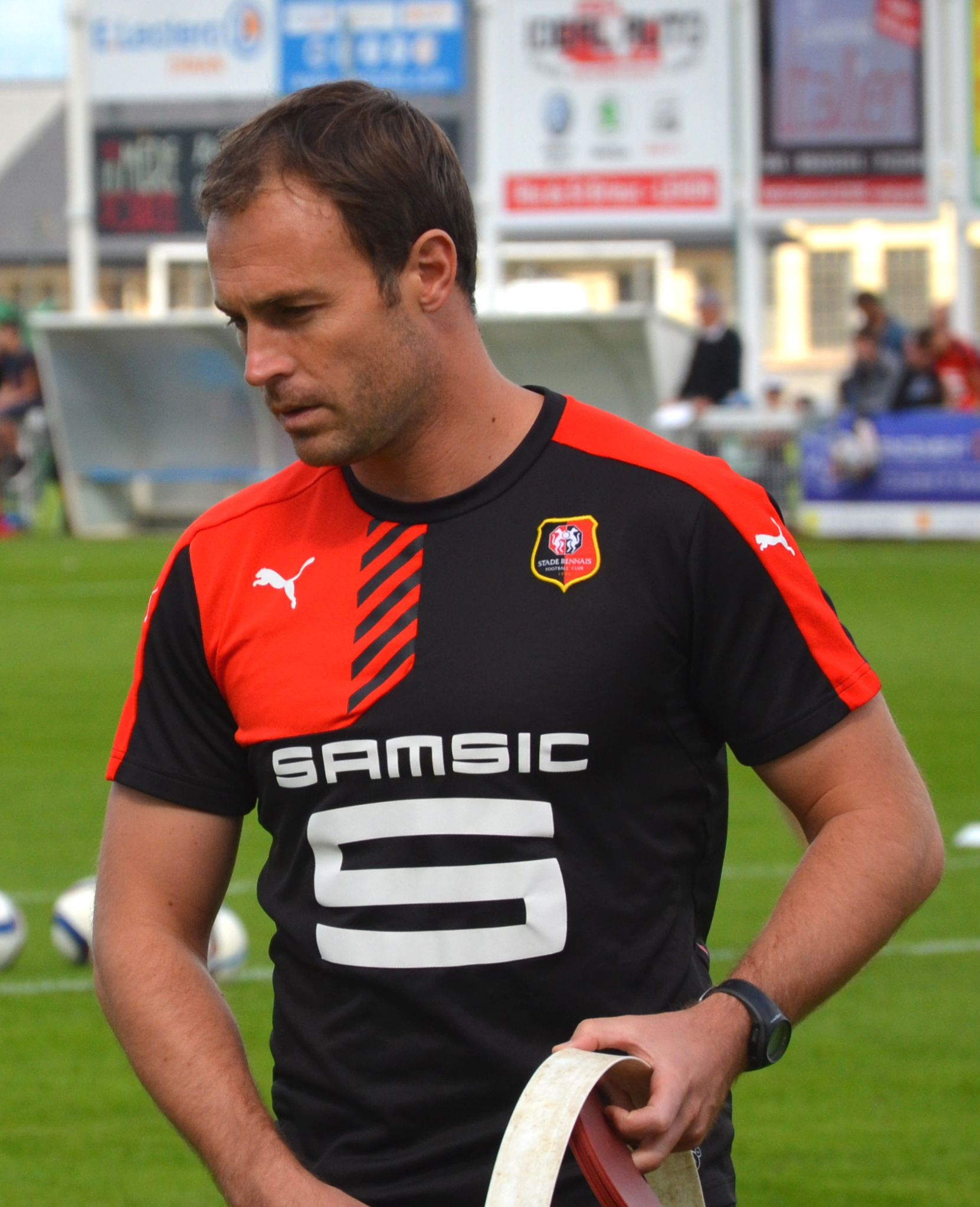 Photographie prise lors d'un entraînement du Stade rennais délocalisé à Dinan. Ici, Christophe Revel.